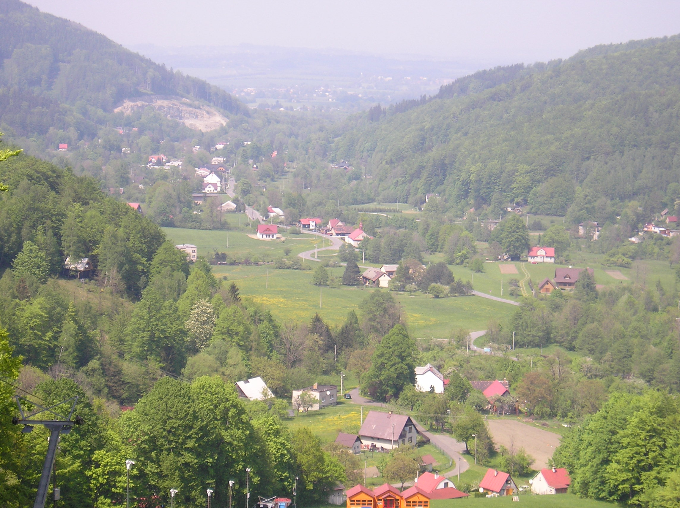 Řeka